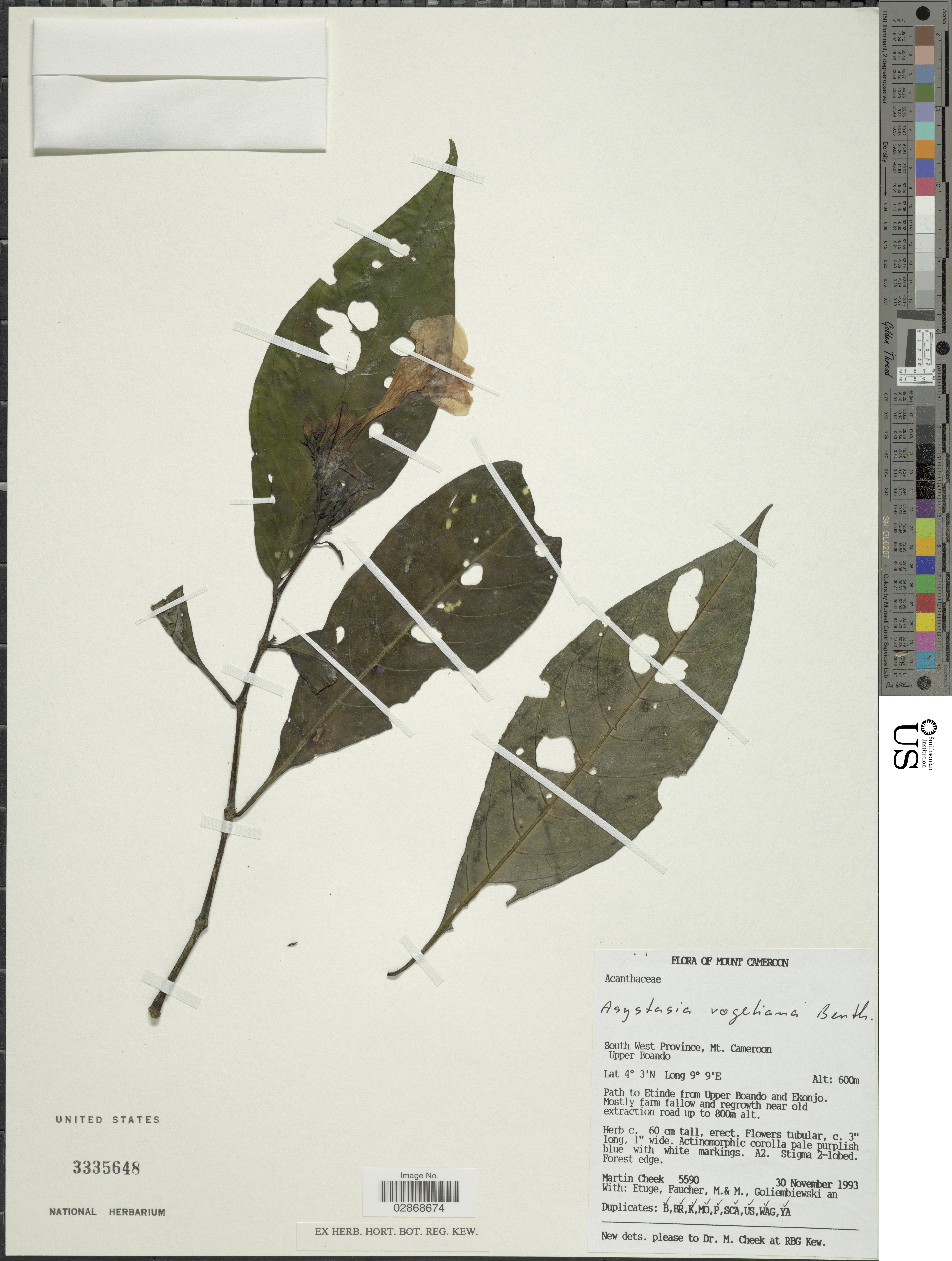 Asystasia vogeliana Benth. Object Details Record Last Modified 24 Sep 2018 Specimen Count 1 Collection Date 30 Nov 1993 Barcode 02868674 USNM Number 3335648 Biogeographical Region 23 - West-Central Tropical Africa Collector Martin R. Cheek Etuge Faucher M. & M. Goliembiewski Min. Elevation 600 Place Mount Cameroon. South West Province. Upper Boando. Path to Etinde from Upper Boando and Ekonjo., Cameroon, Africa Published Name Asystasia vogeliana Benth. See more items in Botany Flowering plants and ferns Taxonomy Plantae Dicotyledonae Scrophulariales Acanthaceae NMNH - Botany Dept. Record ID nmnhbotany_14119825 Metadata Usage CC0